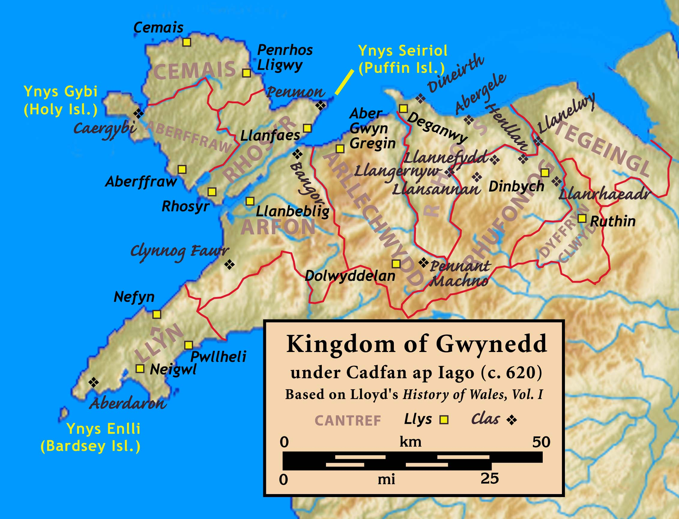 Kingdom of Gwynedd, c. 620